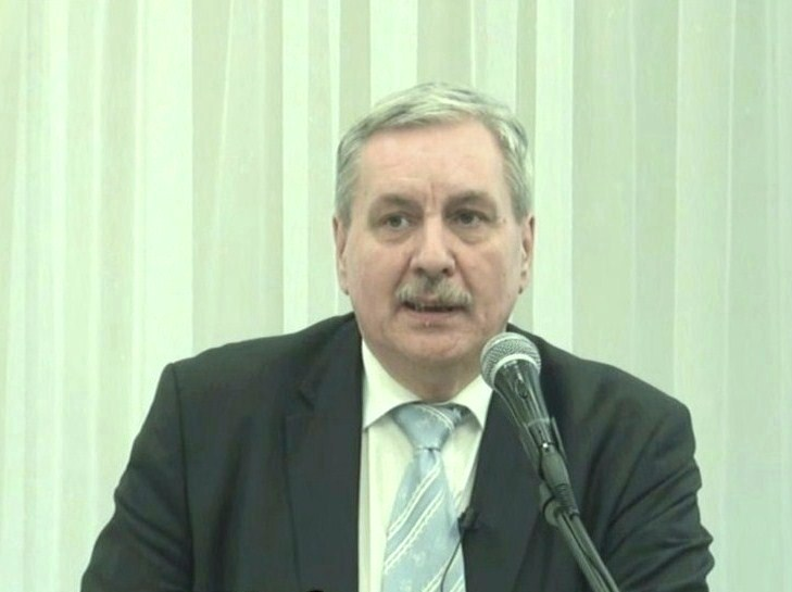 Prof. Jerzy Eisler, historyk.